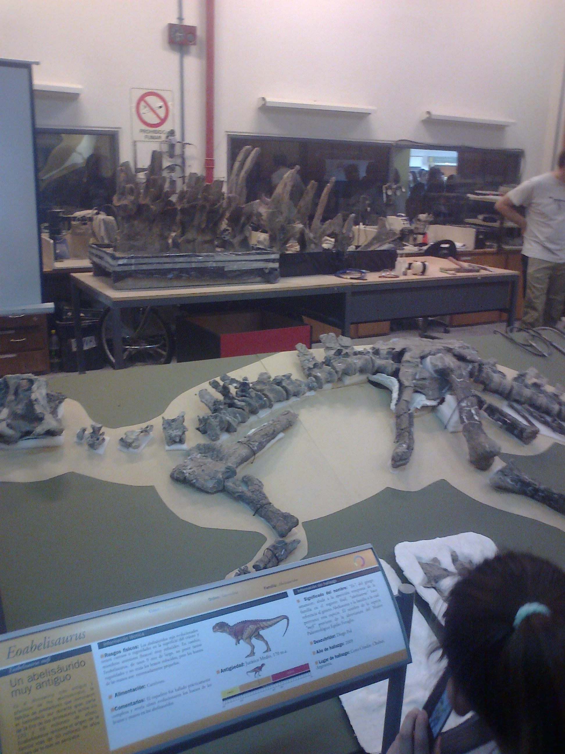 Fosiles del Eoabelisaurus mefi en el Museo Egidio Feruglio de Trelew, Argentina